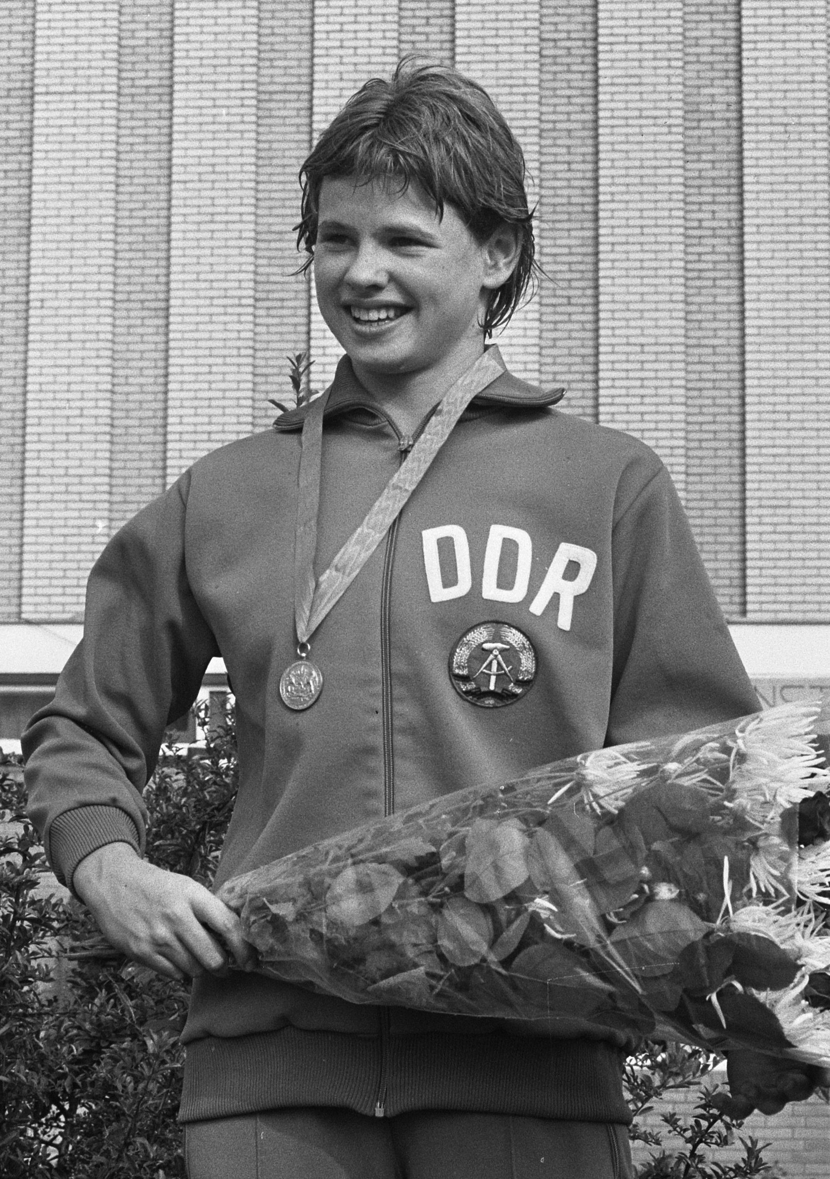 Ulrike Richter